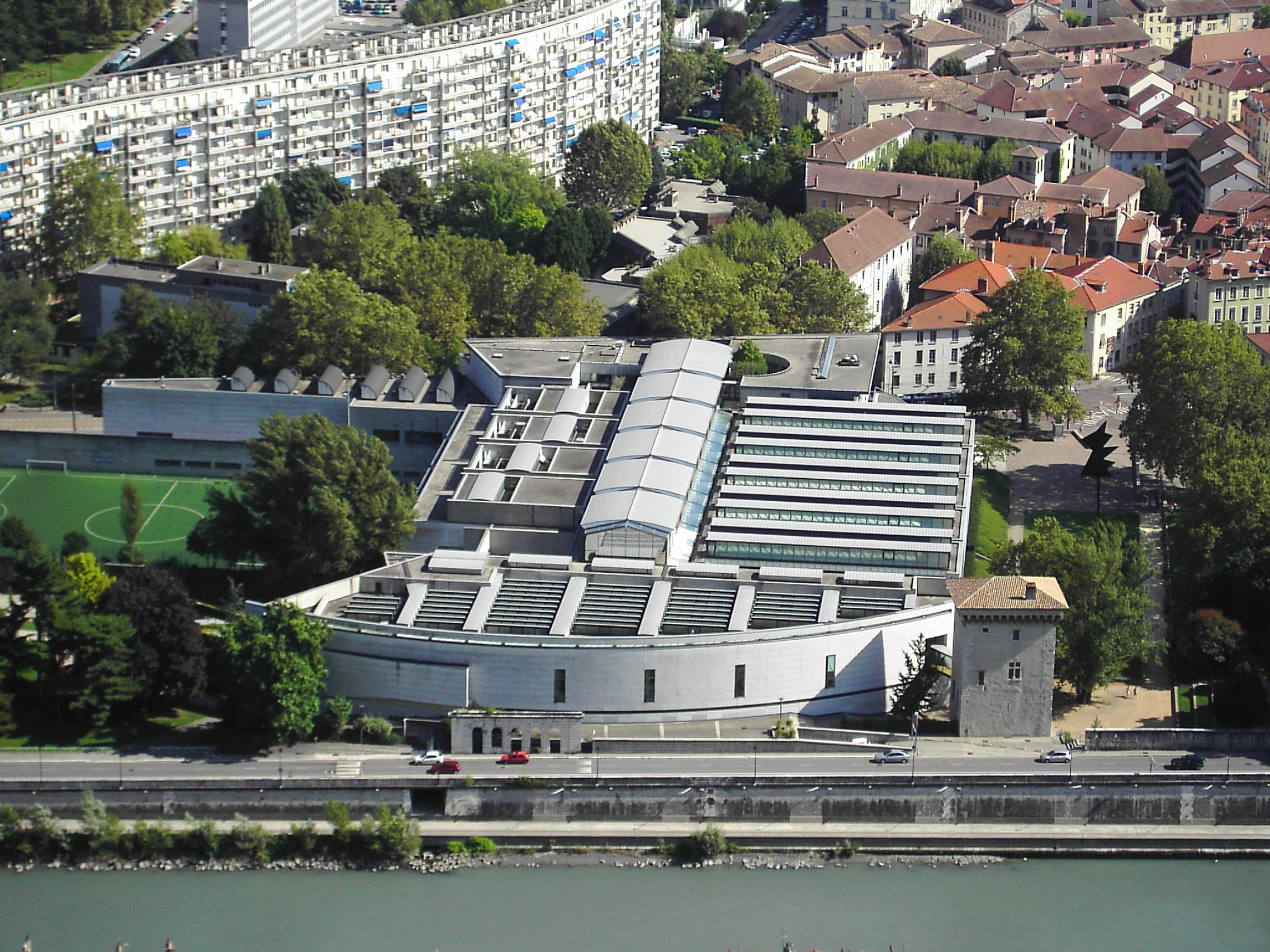 Musée de Grenoble depuis la Bastille avec la Tour de Lisle à droite